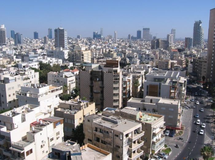 צילום לכיוון דרום מזרח.